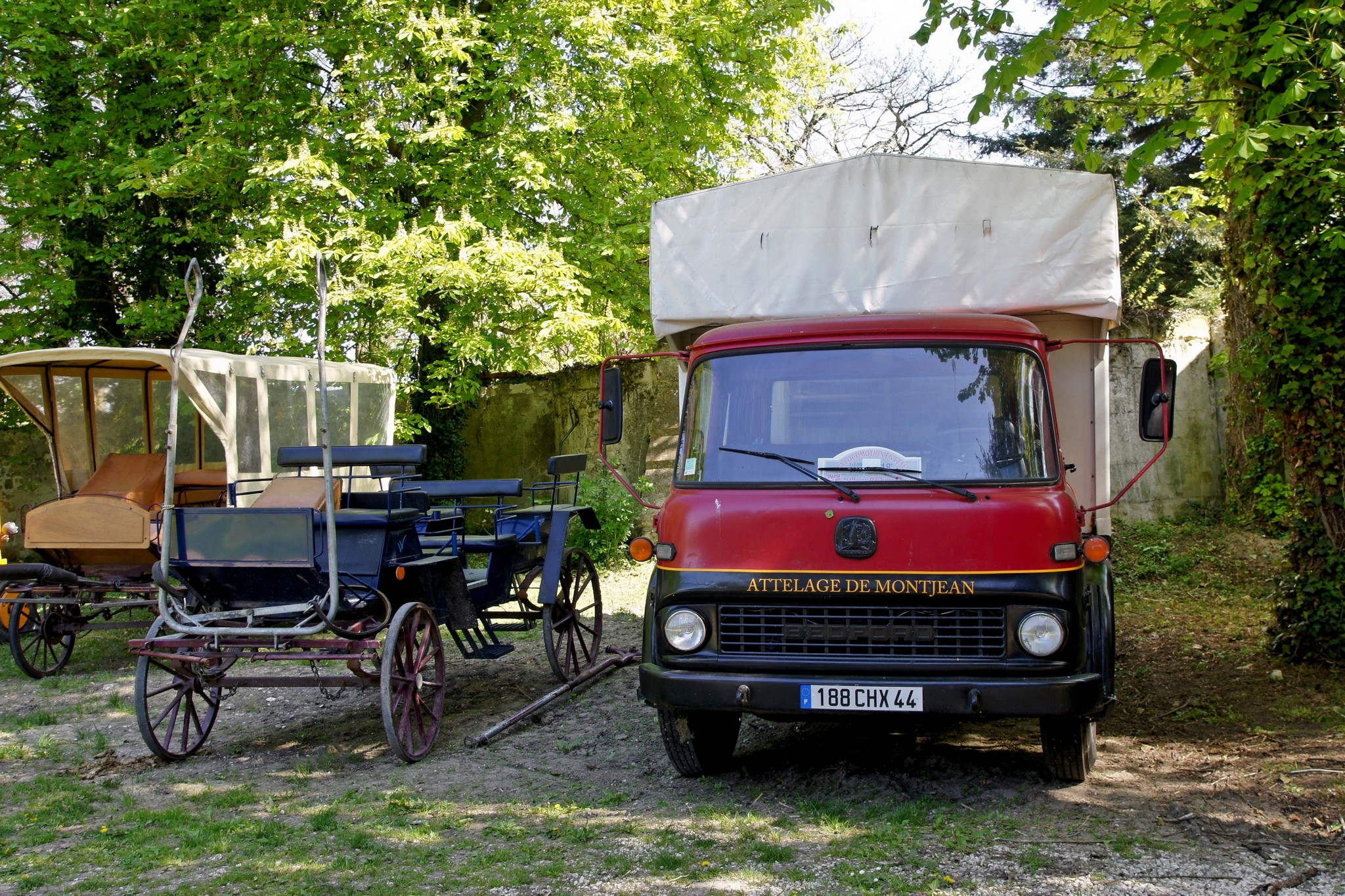 Les attelages de Montjean à Wissous (91